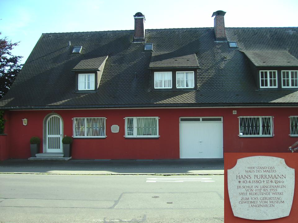 Haus des Künstlers Hans Purrmann, der von 1917 - 1935 in diesem Haus in Langenargen lebte und arbeitete